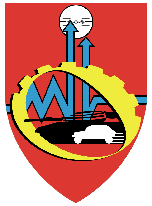 תג מרכז שיקום ואחזקה.